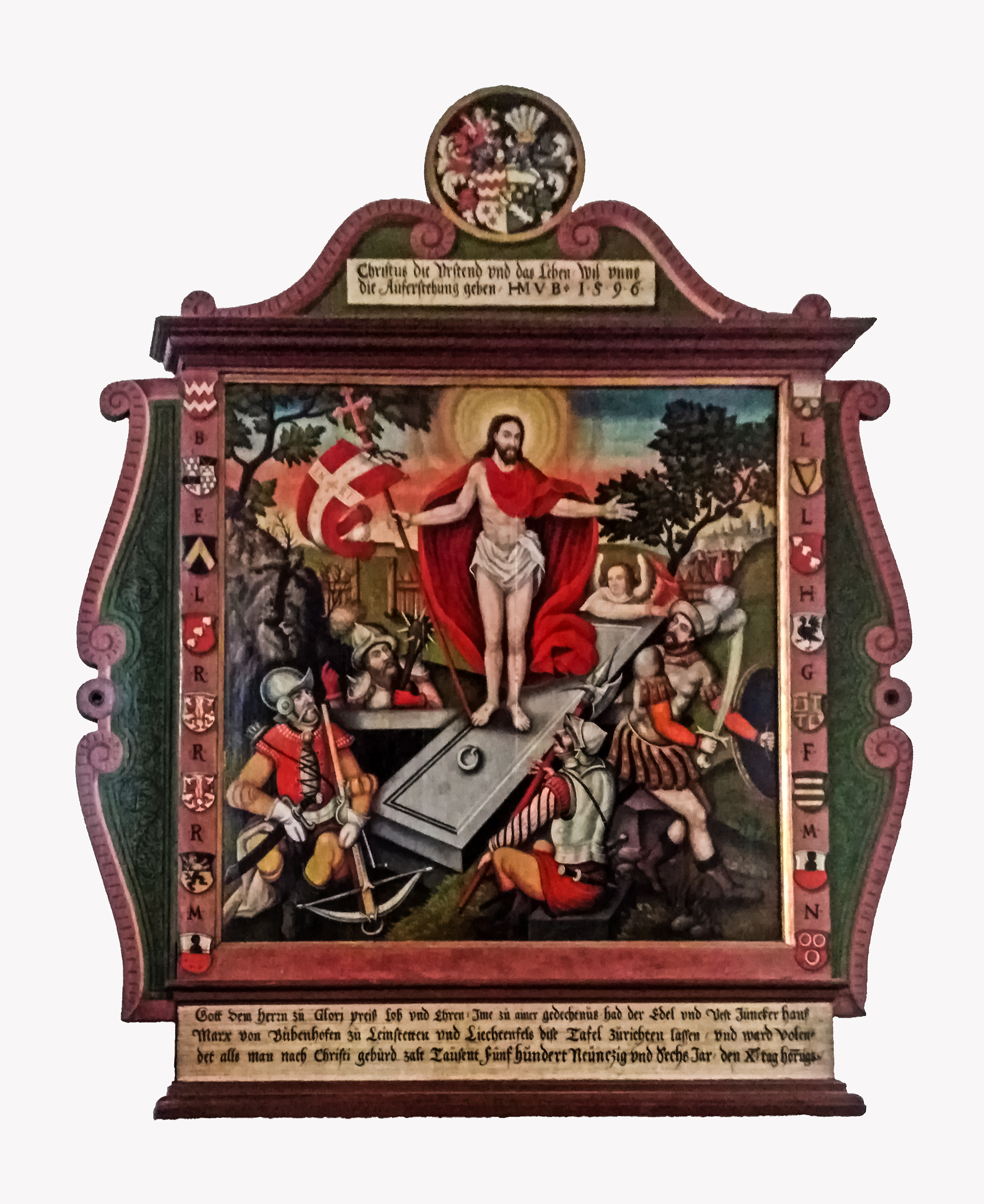 Auferstehung Christi, gestiftet von Marx von Bubenhofen (16. Jh.) - St. Konrad Bettenhausen (Dornhan)